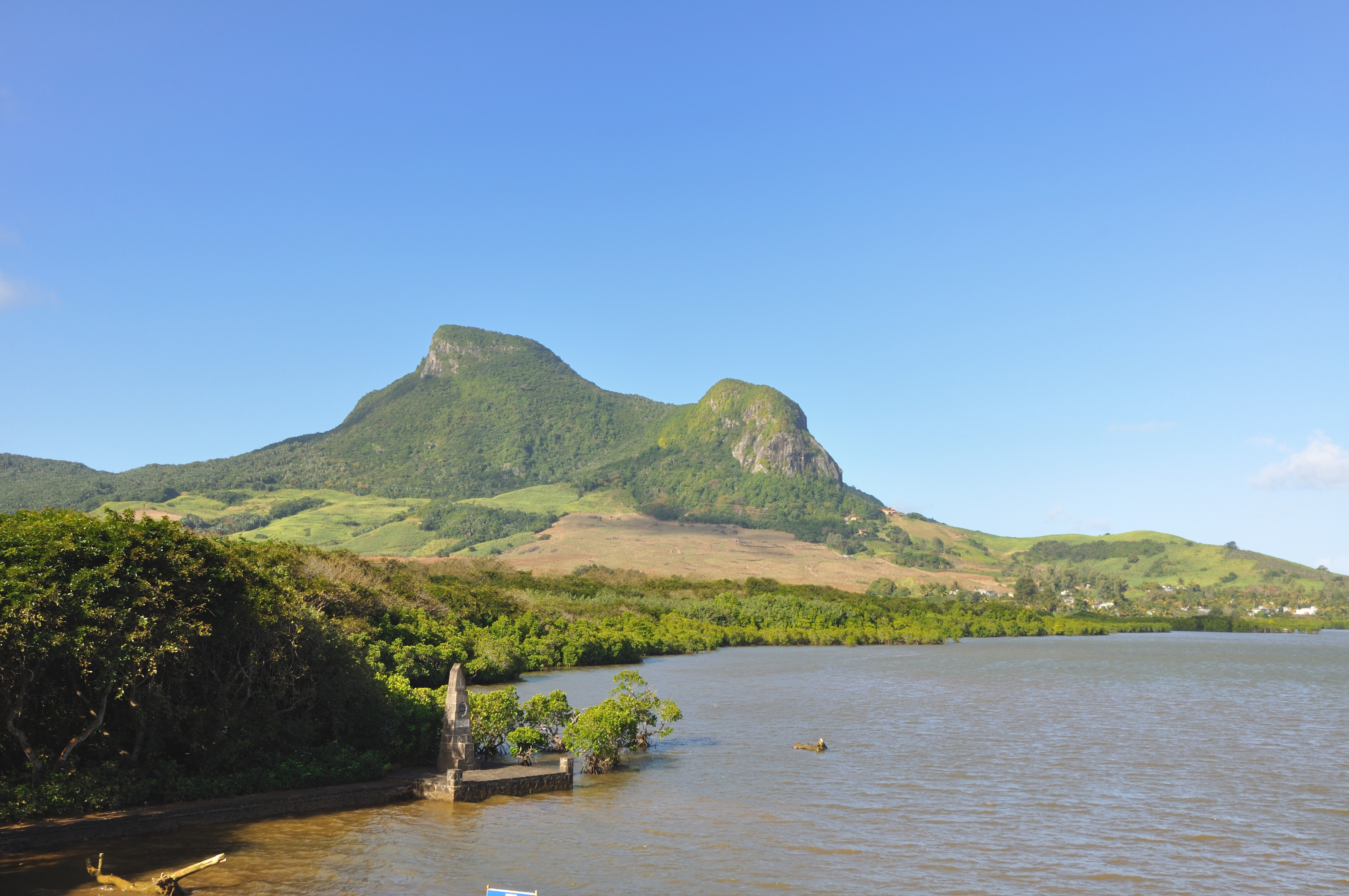 Mauritius, Grand Port, Domaine du Chasseur Reserve